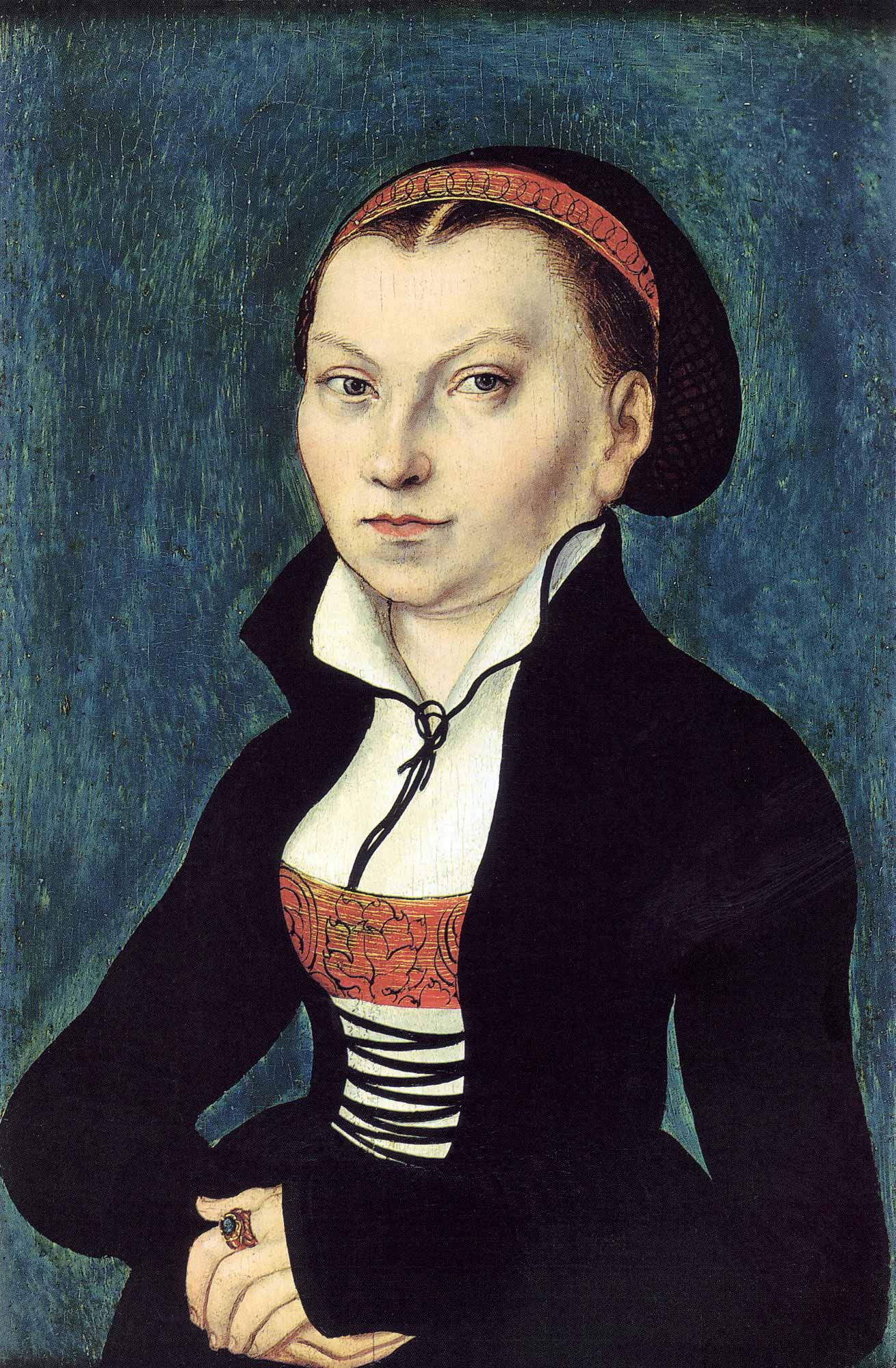 Gemälde Katharina von Bora /Öl auf Eichenholz